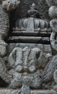 ಕನ್ನಡ: ಹೊಯ್ಸಳ ಶೈಲಿಯ ಶಿಖರ